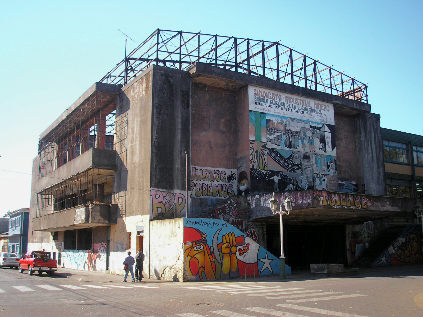 Teatro del Sindicato Nº 6 (Teatro de los Mineros de Lota) This is a photo of a national monument in Chile: 2123